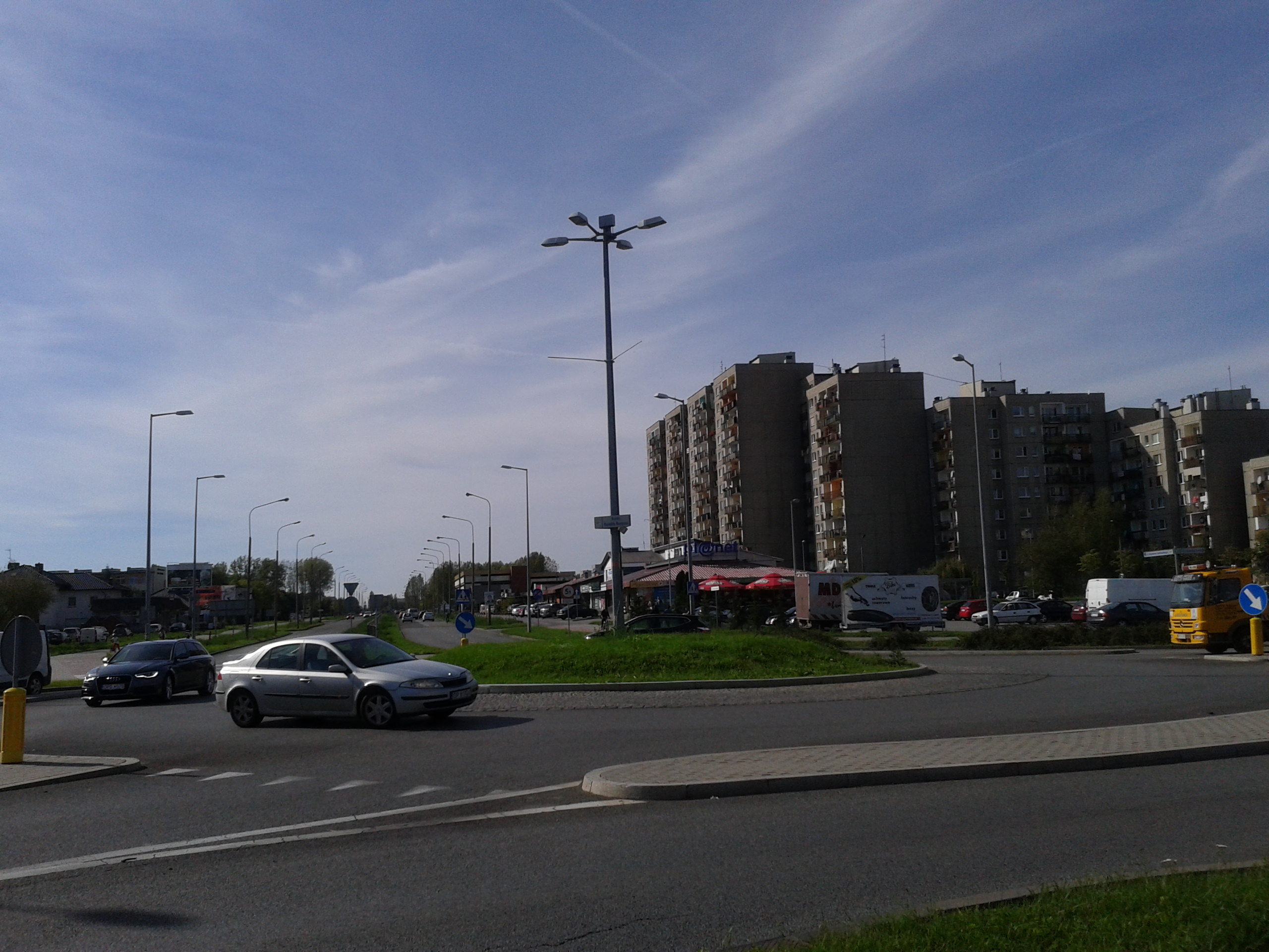 Rondo Ronalda Reagana w Opolu.